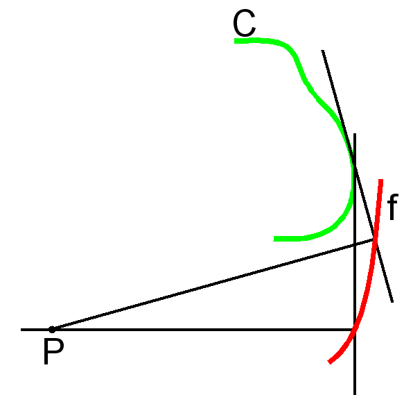 Definición de podaria